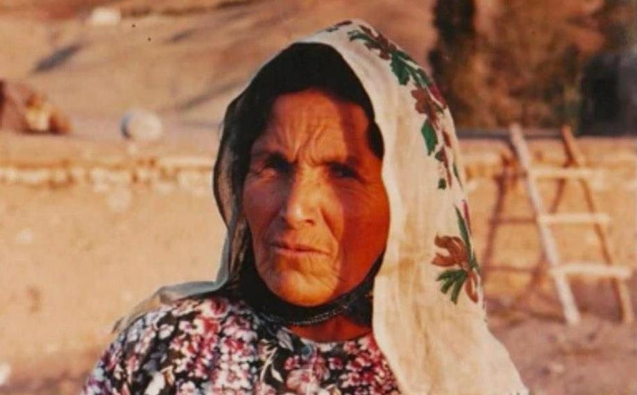 Toraman Köyü Kurucusu Abdullah Yalçın'ın karısı Huriye Yalçın